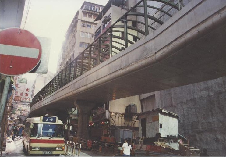 中文（香港）: 九十年代初興建中的登山電梯 (閣鄰街,中環,香港)